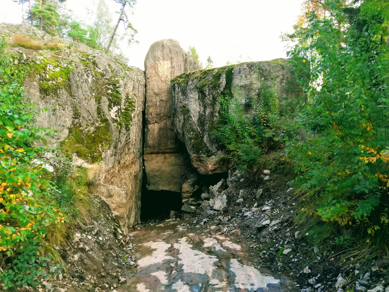 luola